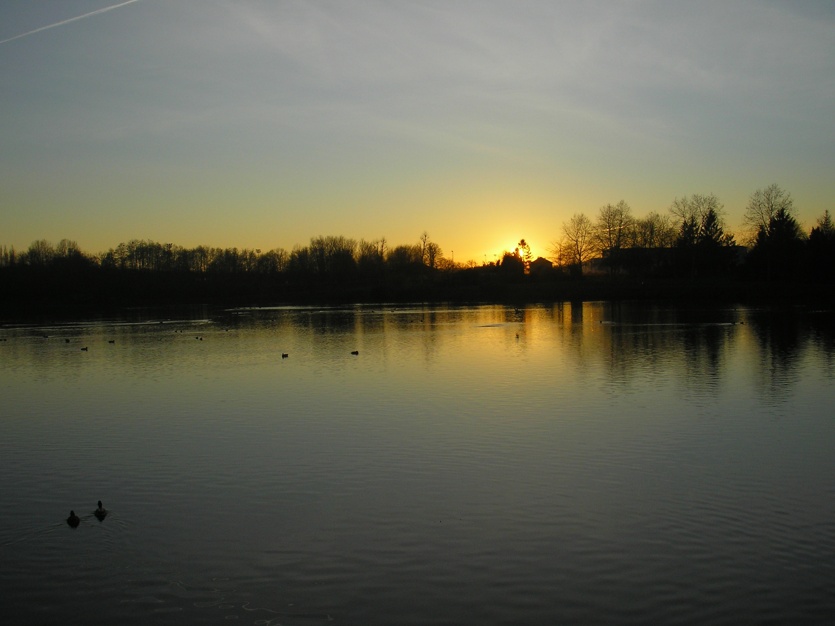 Flers (Normandie, France). Coucher de soleil sur l'étang du château.